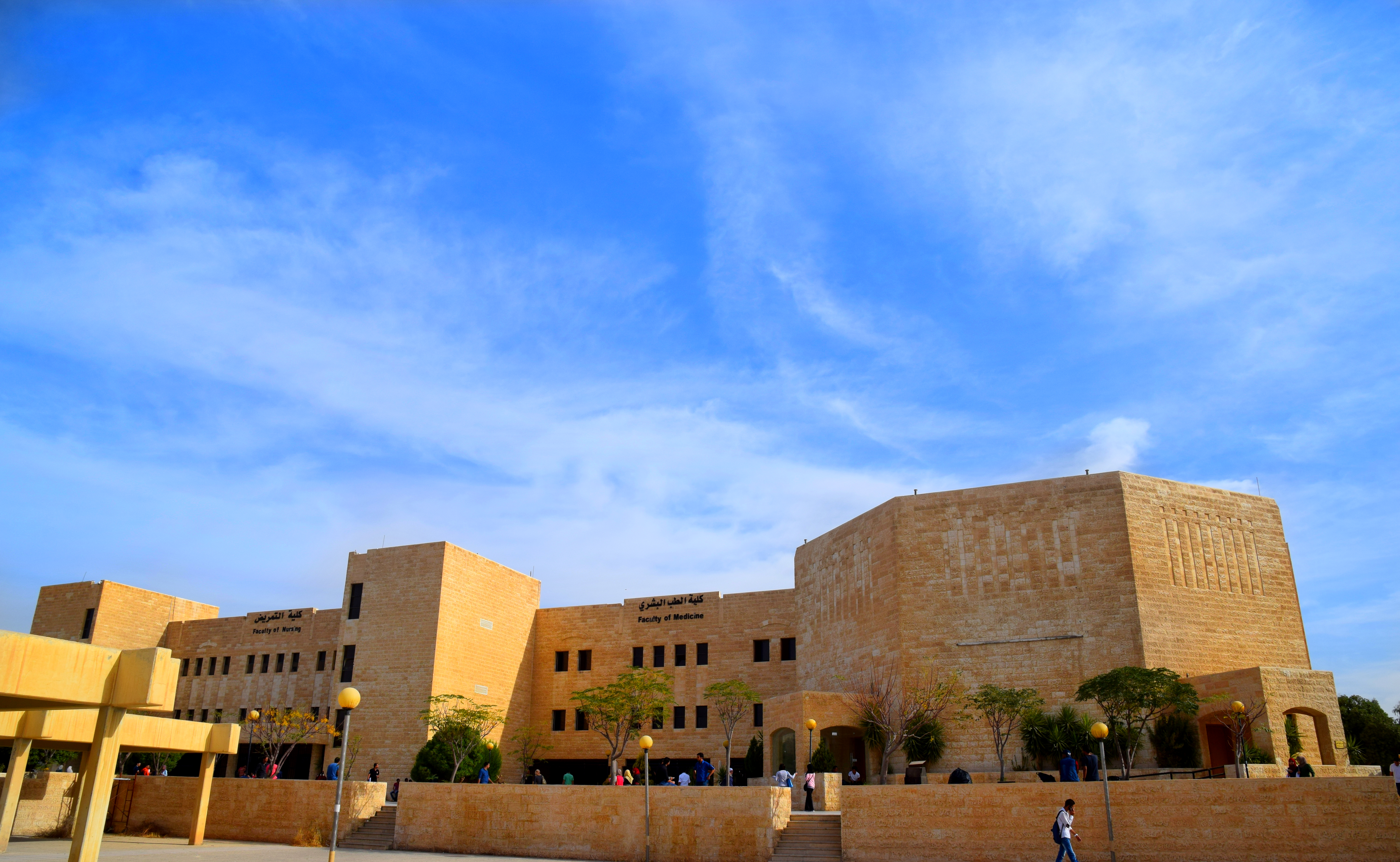 الهاشمية